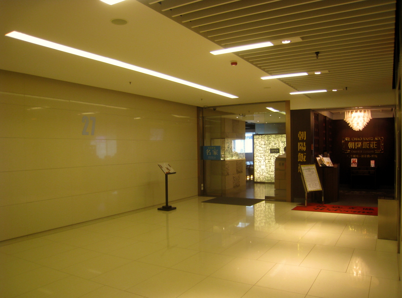 iSQUARE 27F Restaurant